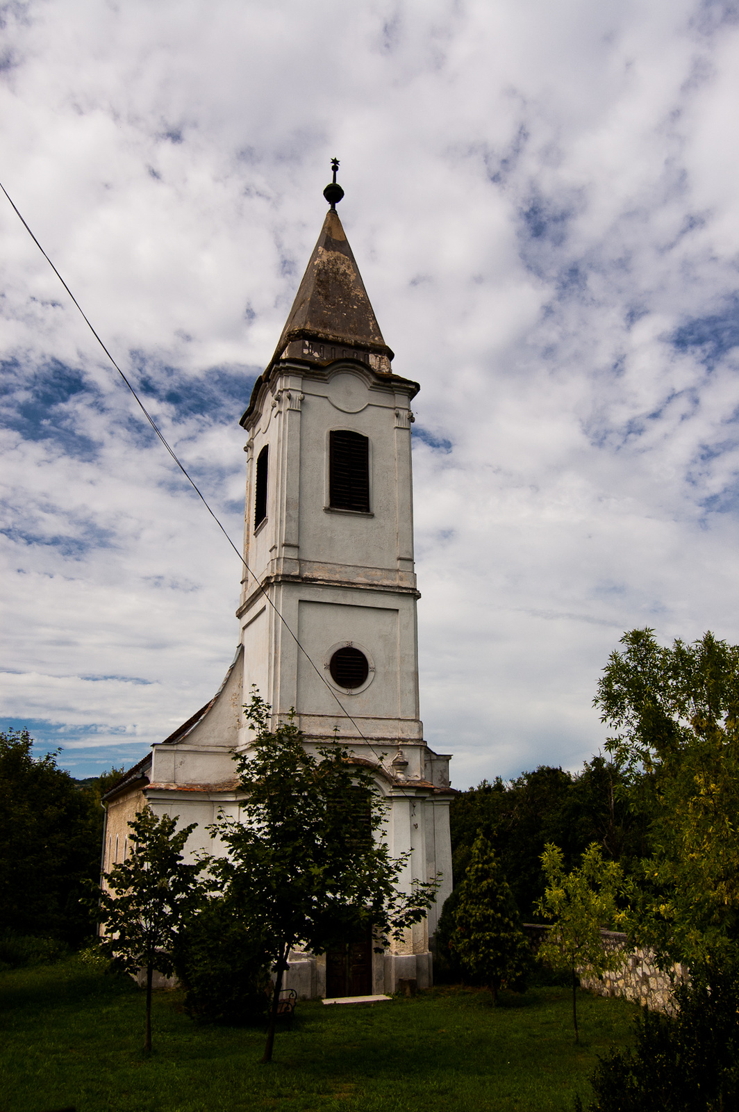 Ref. templom (Szentantalfa, Templom utca) This is a photo of a monument in Hungary. Identifier: 10351